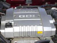 GDI Motor